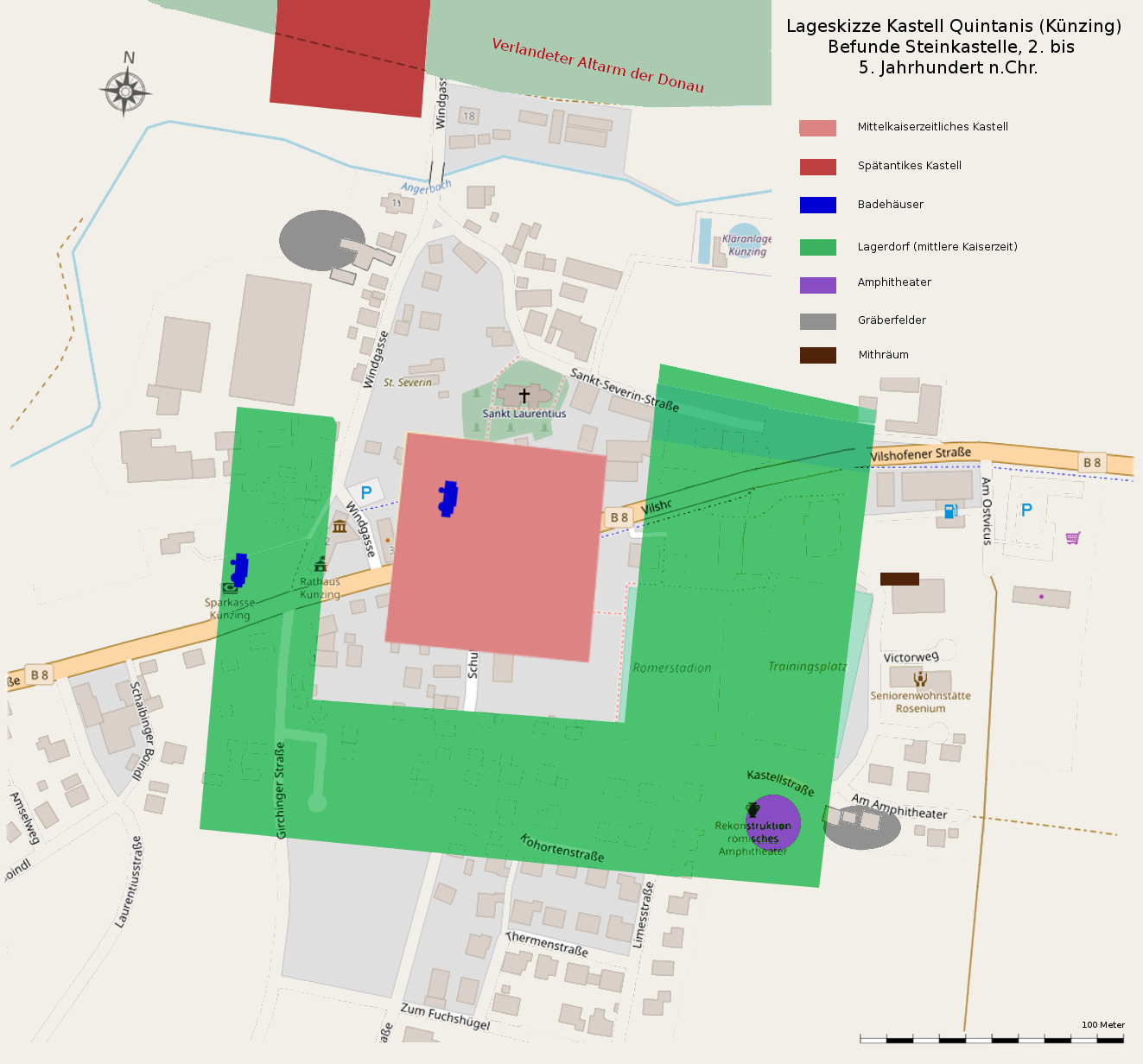 Lageskizze Kastelle, Vicus und Gräberfelder in Künzing (D) 2. bis 5. Jahrhundert n.Chr. ©OpenStreetMap und Mitarbeiter, Ergänzung: Veleius / Veleius at German Wikipedia